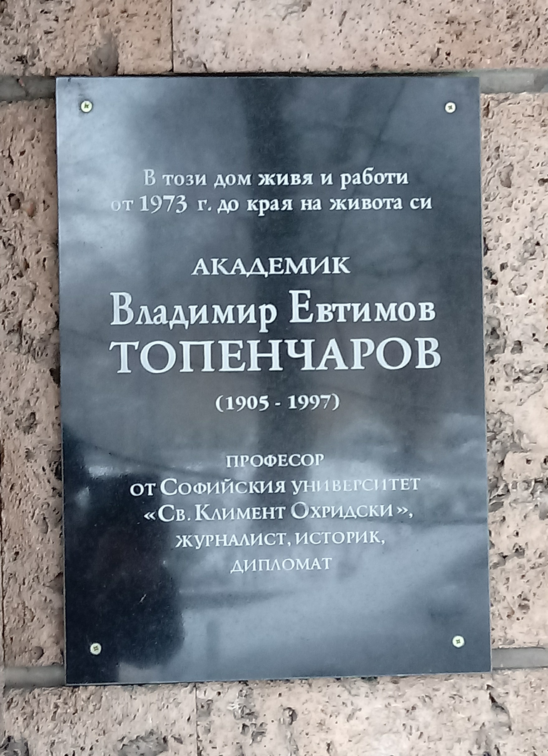 Vladimir Topencharov memorial plaque, 15 San Stefano Str., Sofia